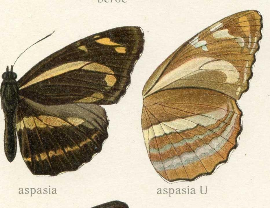 Neptis aspasia